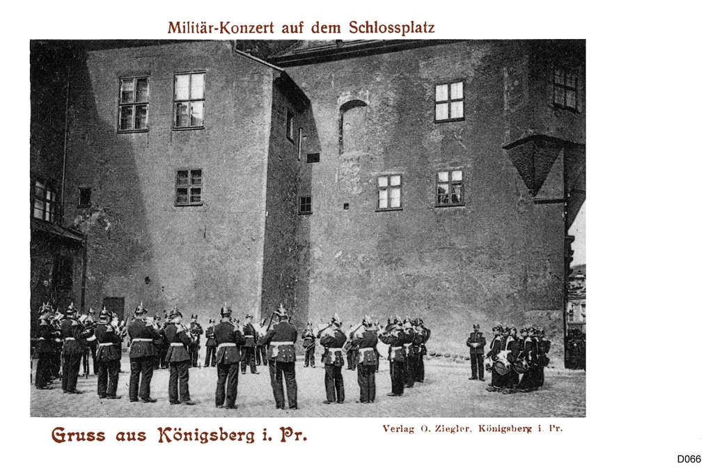 Konzert auf dem Königsberger Schlossplatz